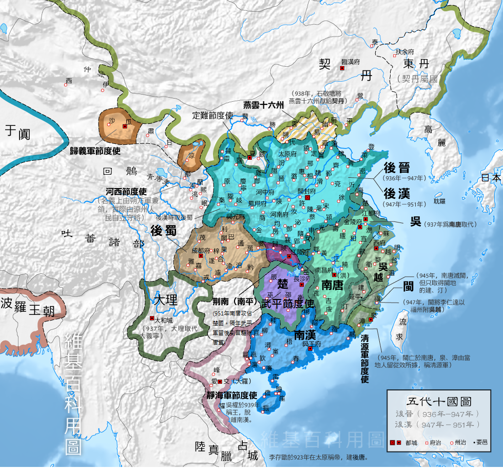 五代